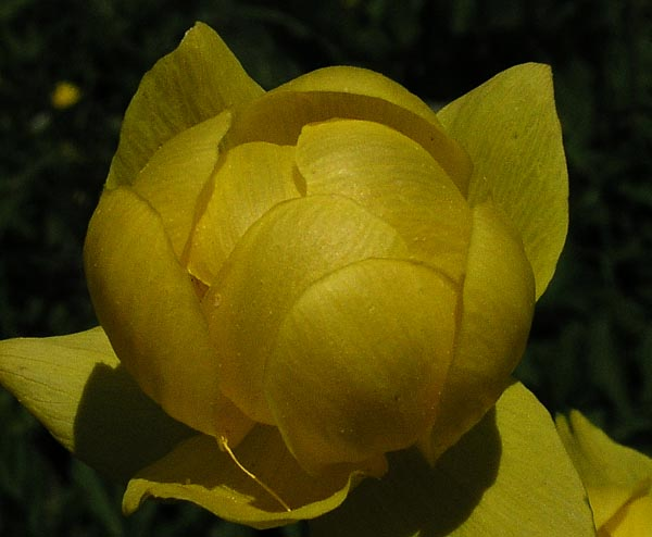 Trollblume (trollius europaeus), aufgenommen auf einer Bergwiese in der Nähe der Wannenkopfhütte in den Allgäuer Alpen